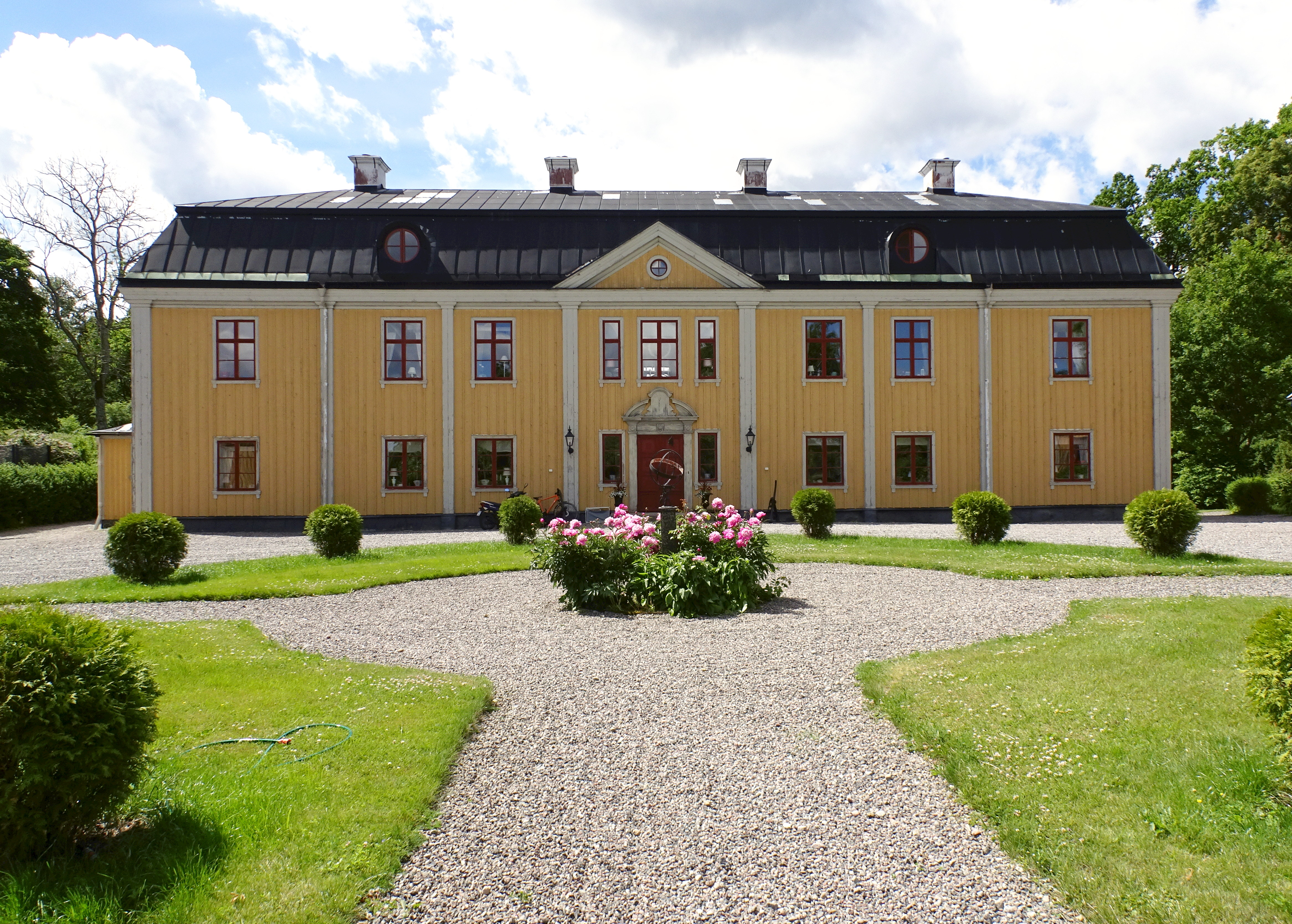 Tvetabergs säteri huvudbyggnaden från öster